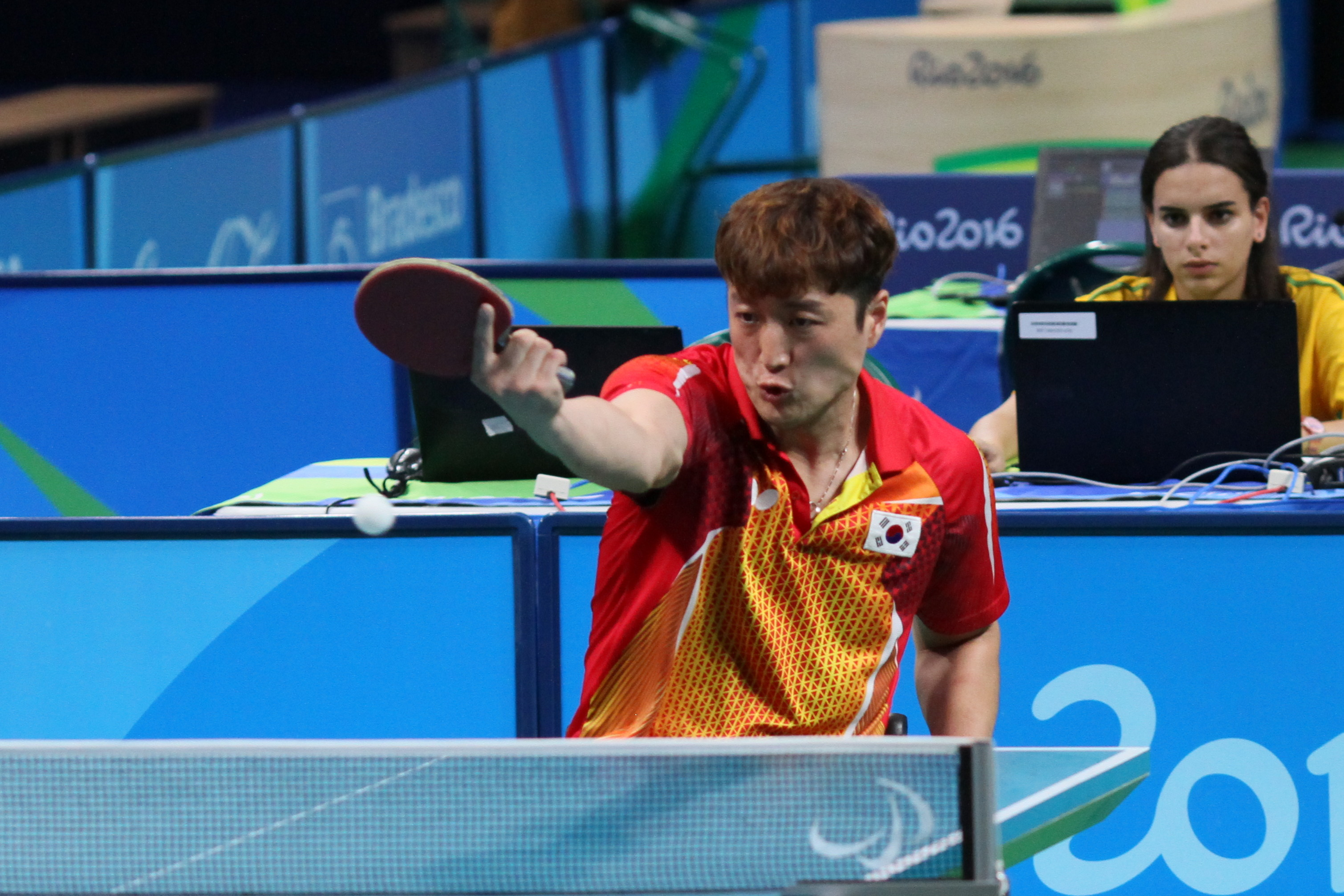 KIM Jung-Gil (KOR,M4) IMG_5259